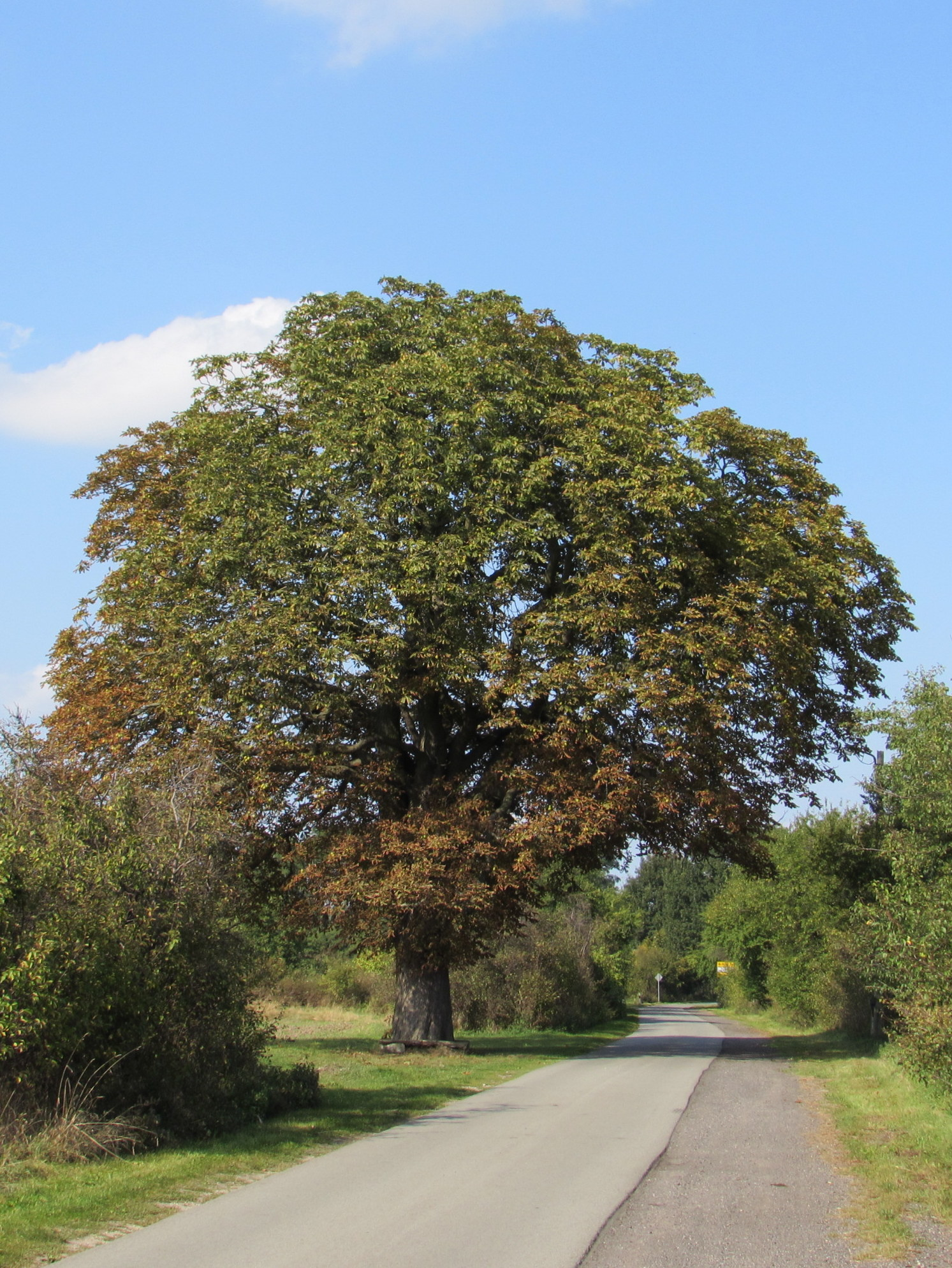 kastanie seelensdorfer damm